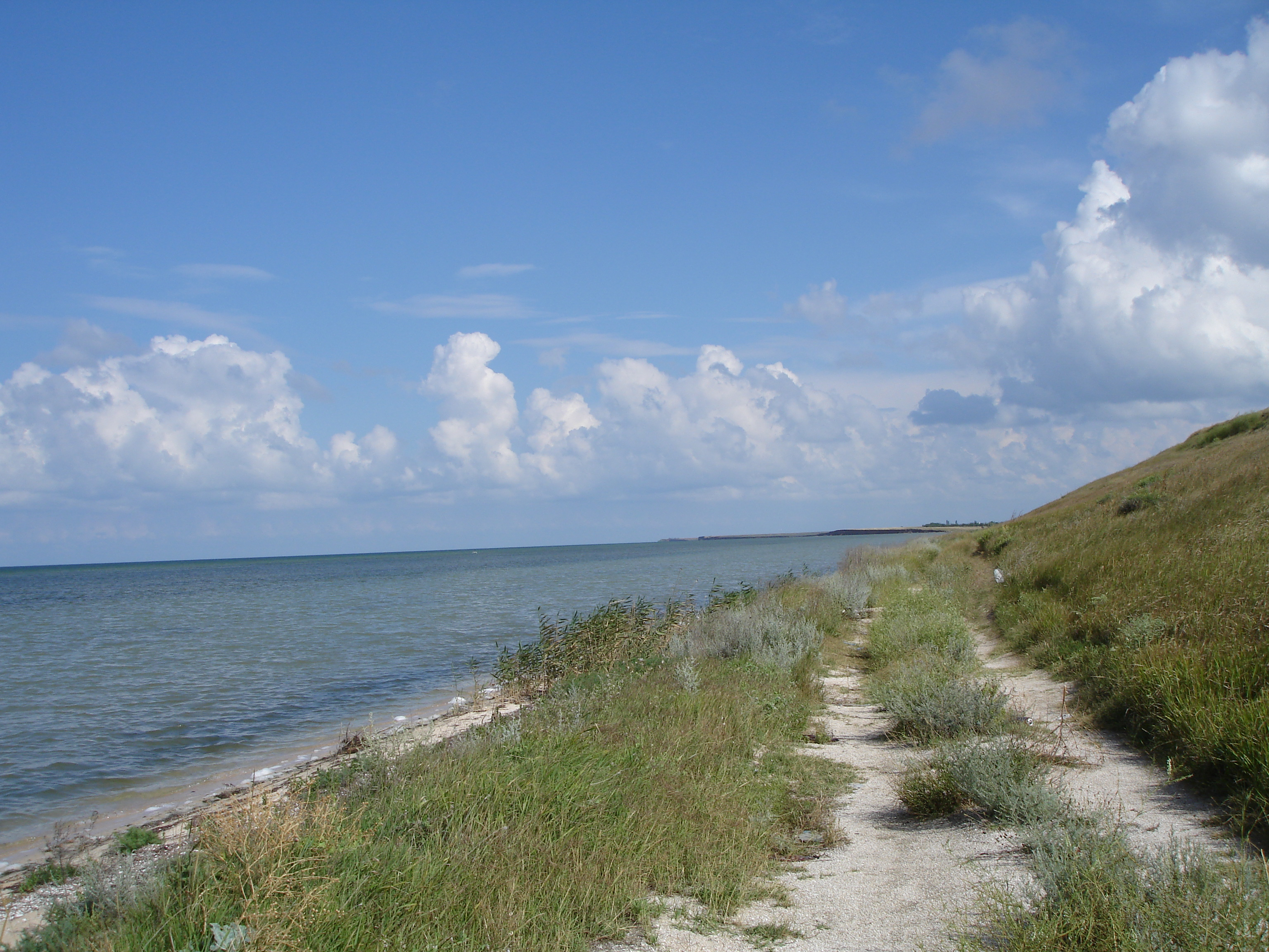 Калинівський, Джанкойський р-н, с. Прозрачне